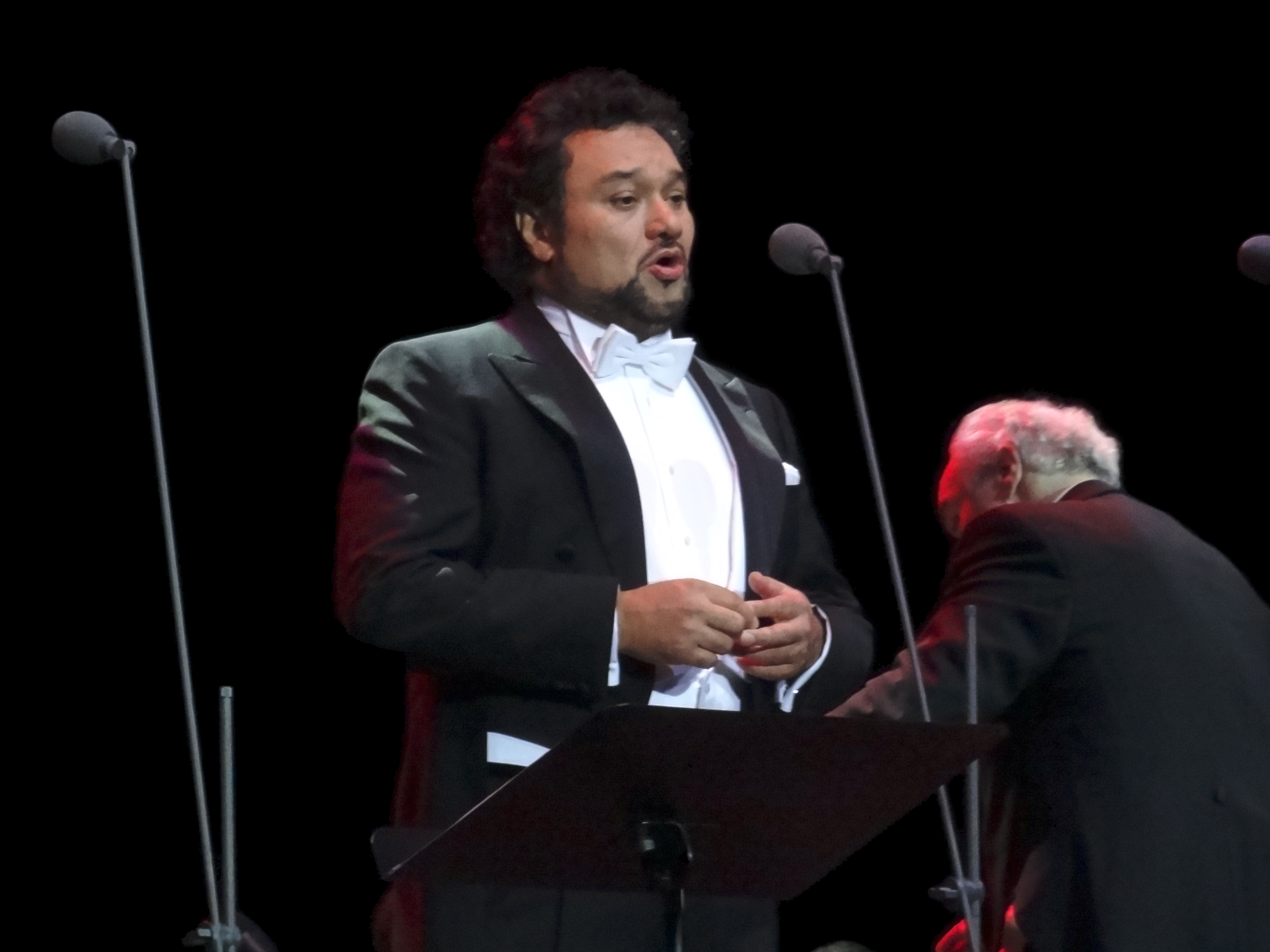 Ramón Vargas, Юбилейный концерт Дмитрия Хворостовского, Санкт-Петербург, 2013